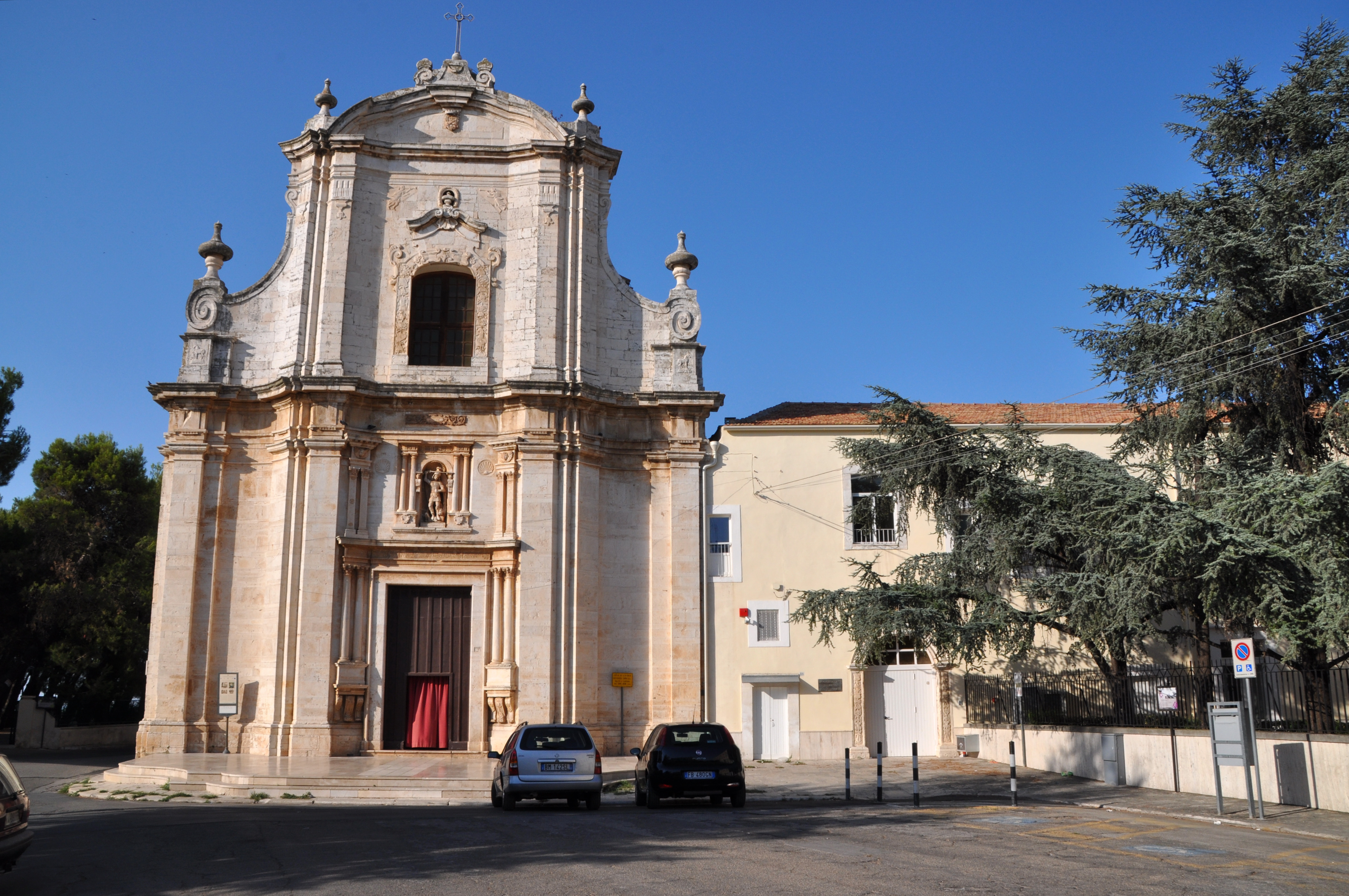 Chiesa di San Michele Arcangelo à Ruvo di Puglia (1785) sur le site de la Pineta.